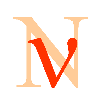 Greek letter